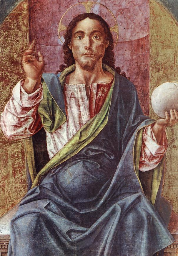 detail